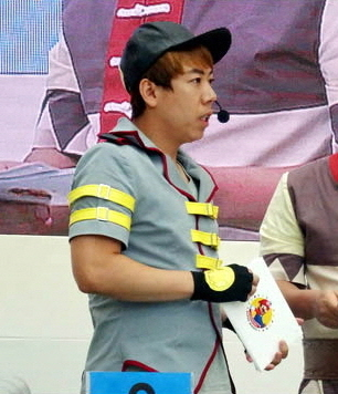 한국닌텐도 슈퍼 마리오 캠페인 이벤트 현장